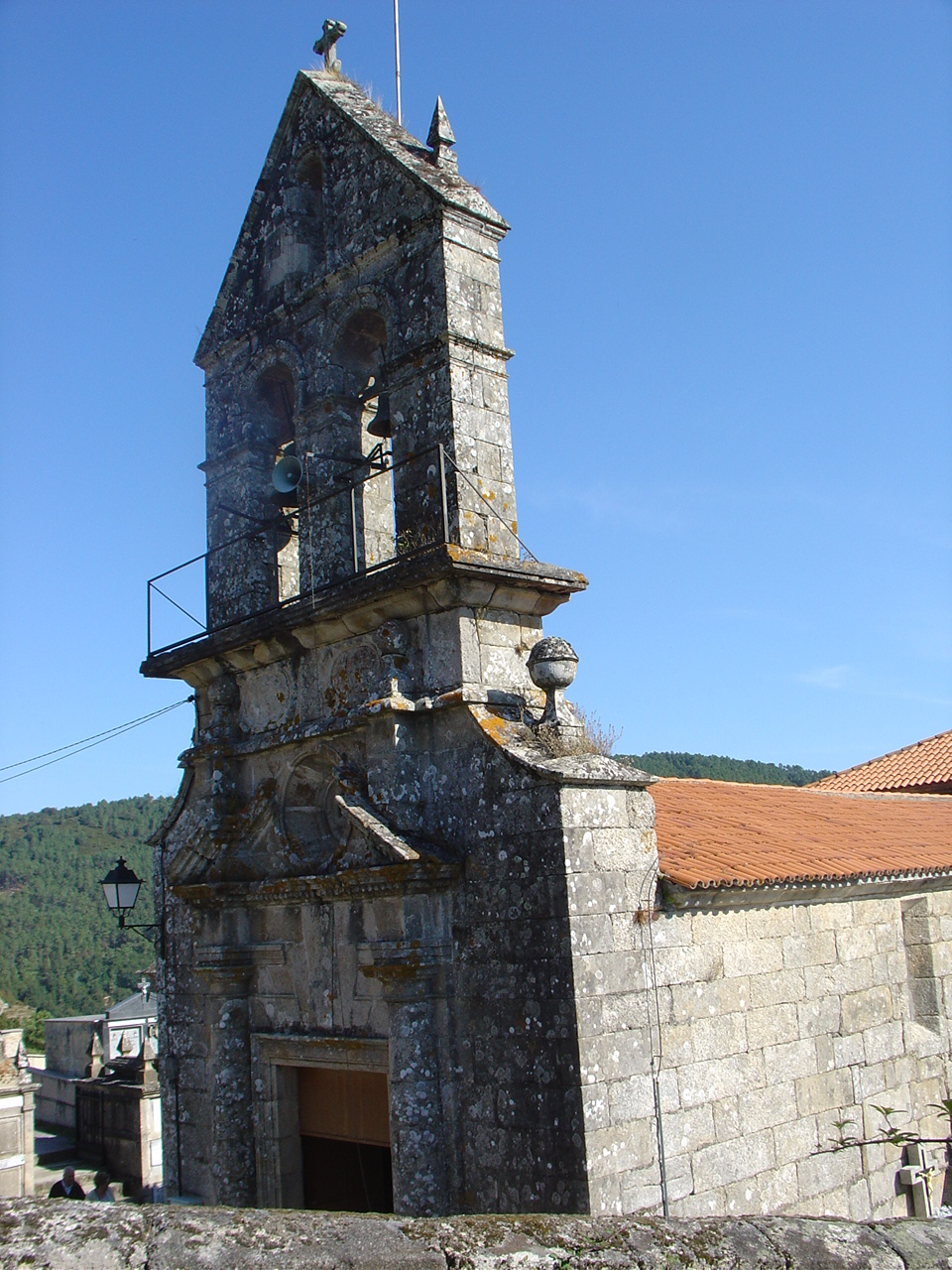 fachada de la iglesia de Graíces (A Peroxa, Ourense)